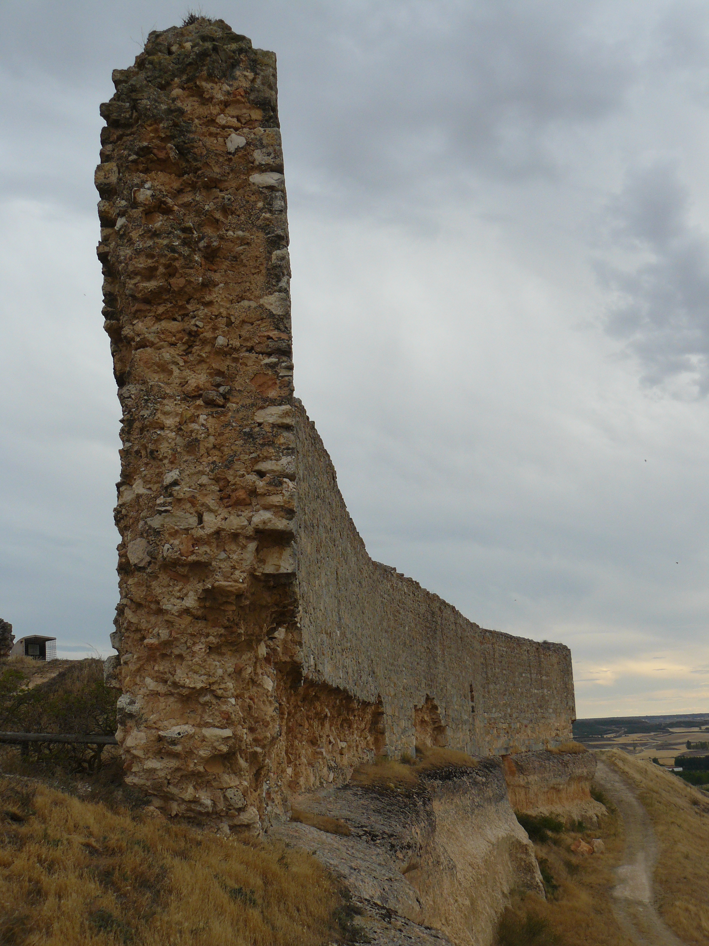 =Castillo de San Esteban de Gormaz, Soria.